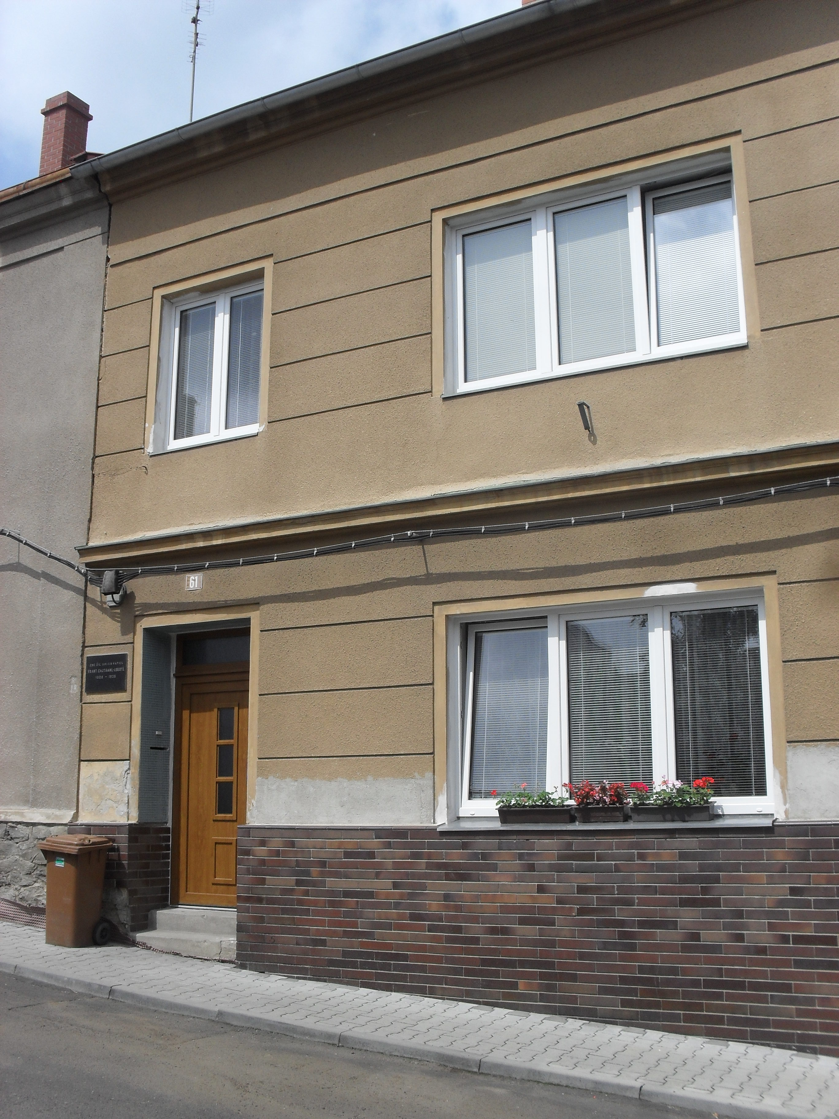 Cajthamlův dům v Bystřanech, okres Teplice.